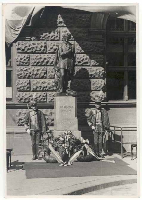 d. Lendvay Márton szobra a régi Nemzeti Színház Blaha Lujza téri volt épületénél. Ma a Várban, az Országház utcában áll